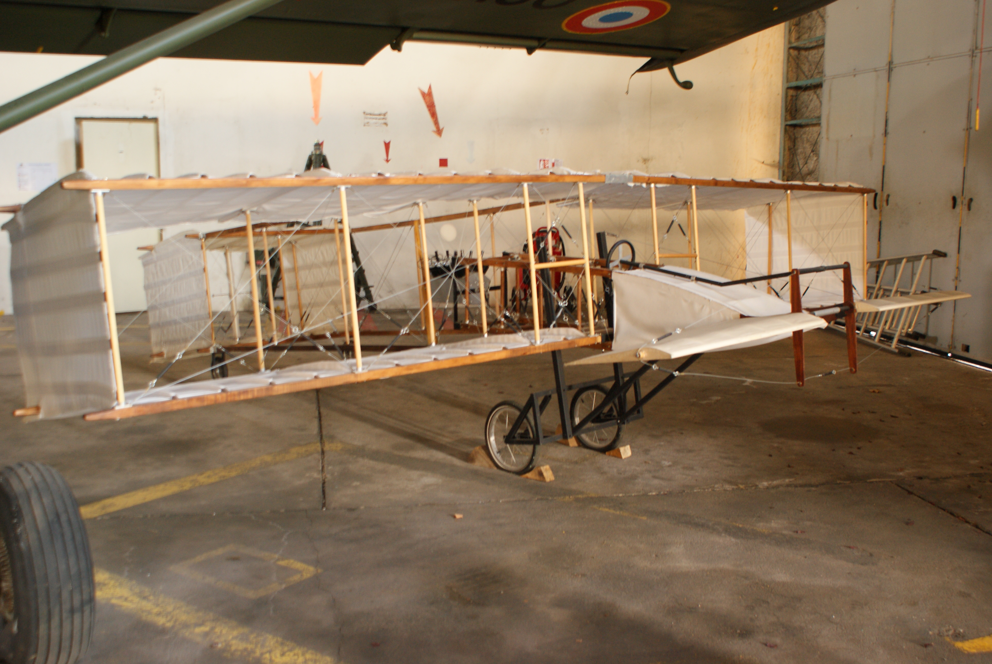 Aéronef Zipfel 1908 sur plan Voisin (1er vol d'un plus lourd que l'air dans la Région Rhone Alpes)